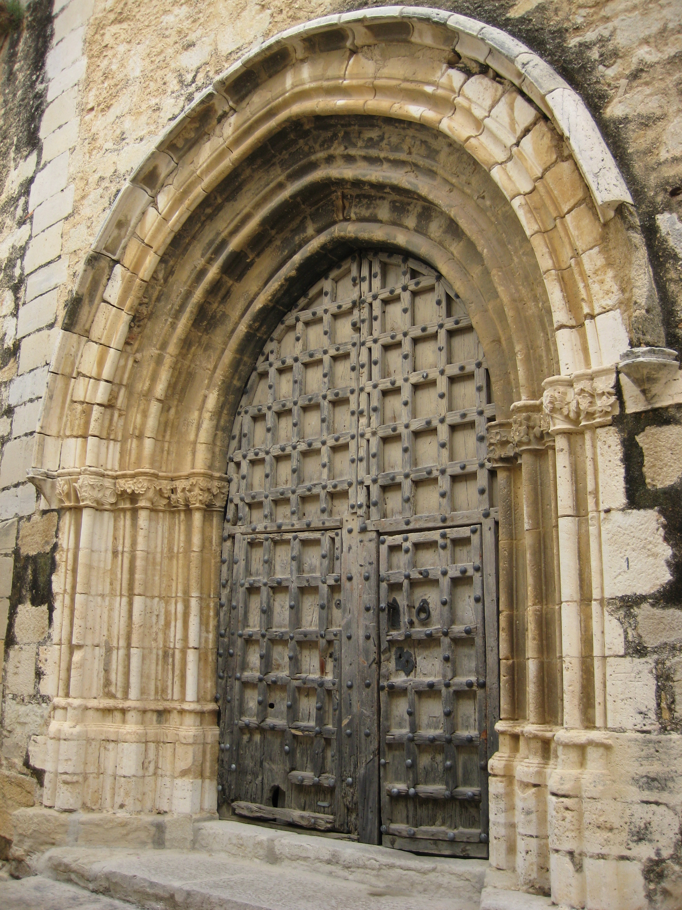 Portada lateral gòtica de l'església vella de Xert (Baix Maestrat)